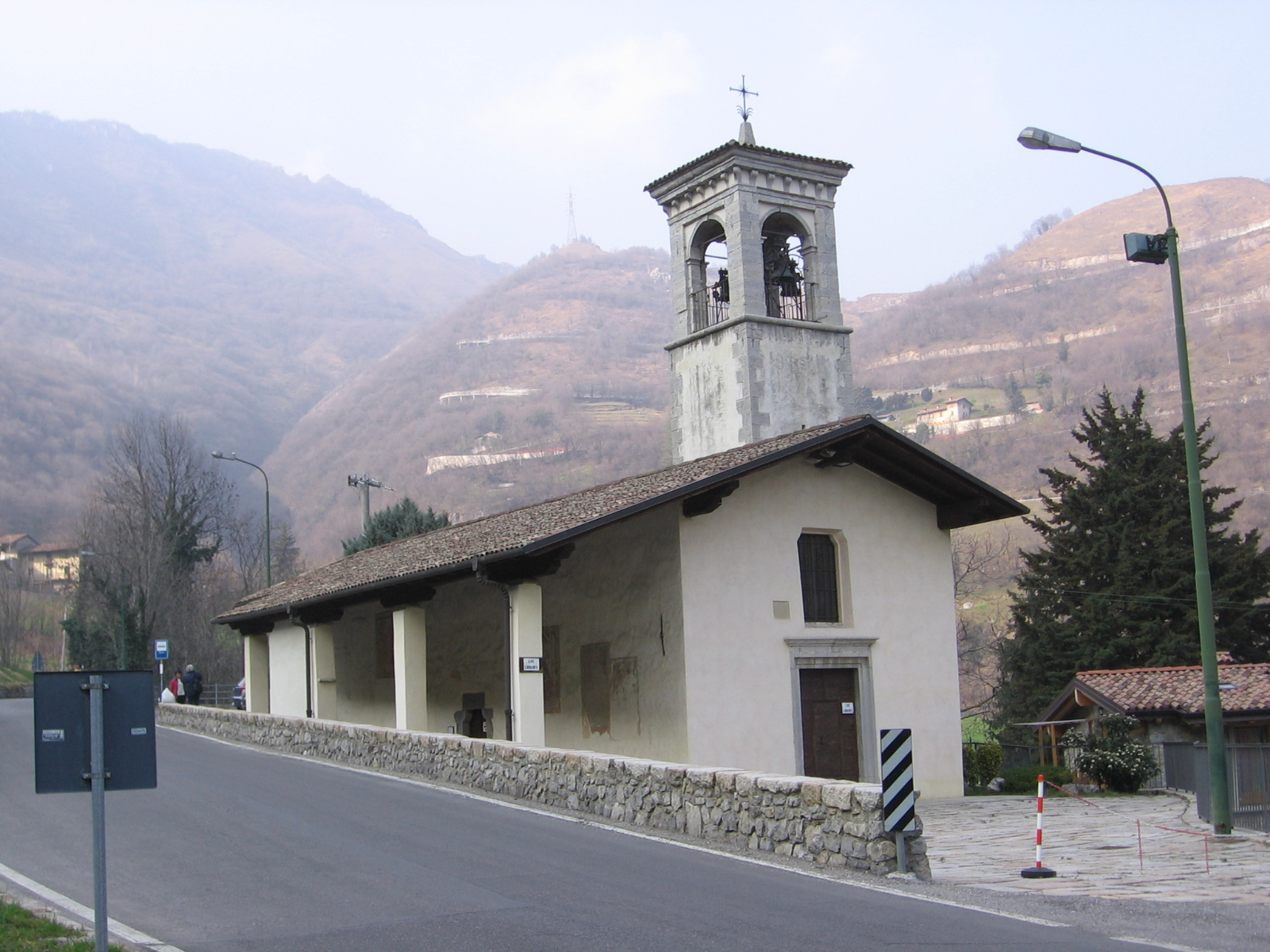 fraz. San Vito, Nembro, Bergamo, Italy